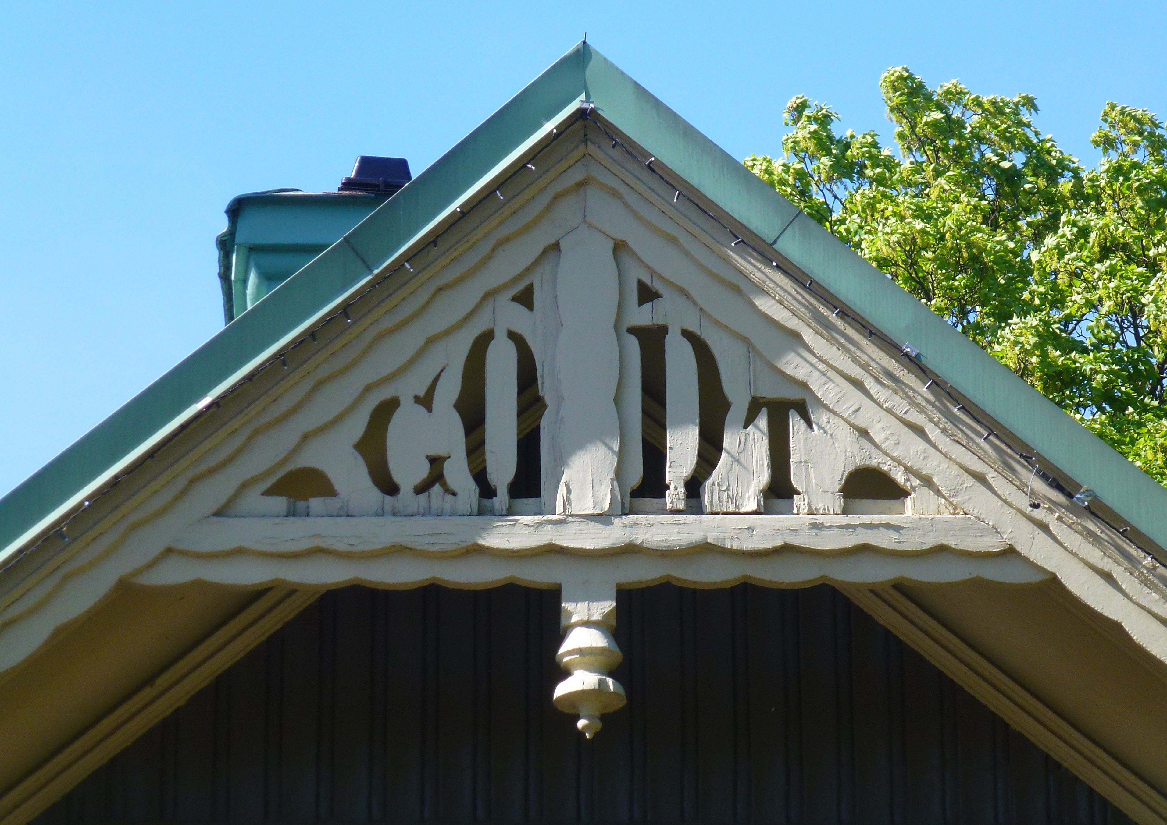 Villa Godthem, detalj i gavelspetsen "GODT"